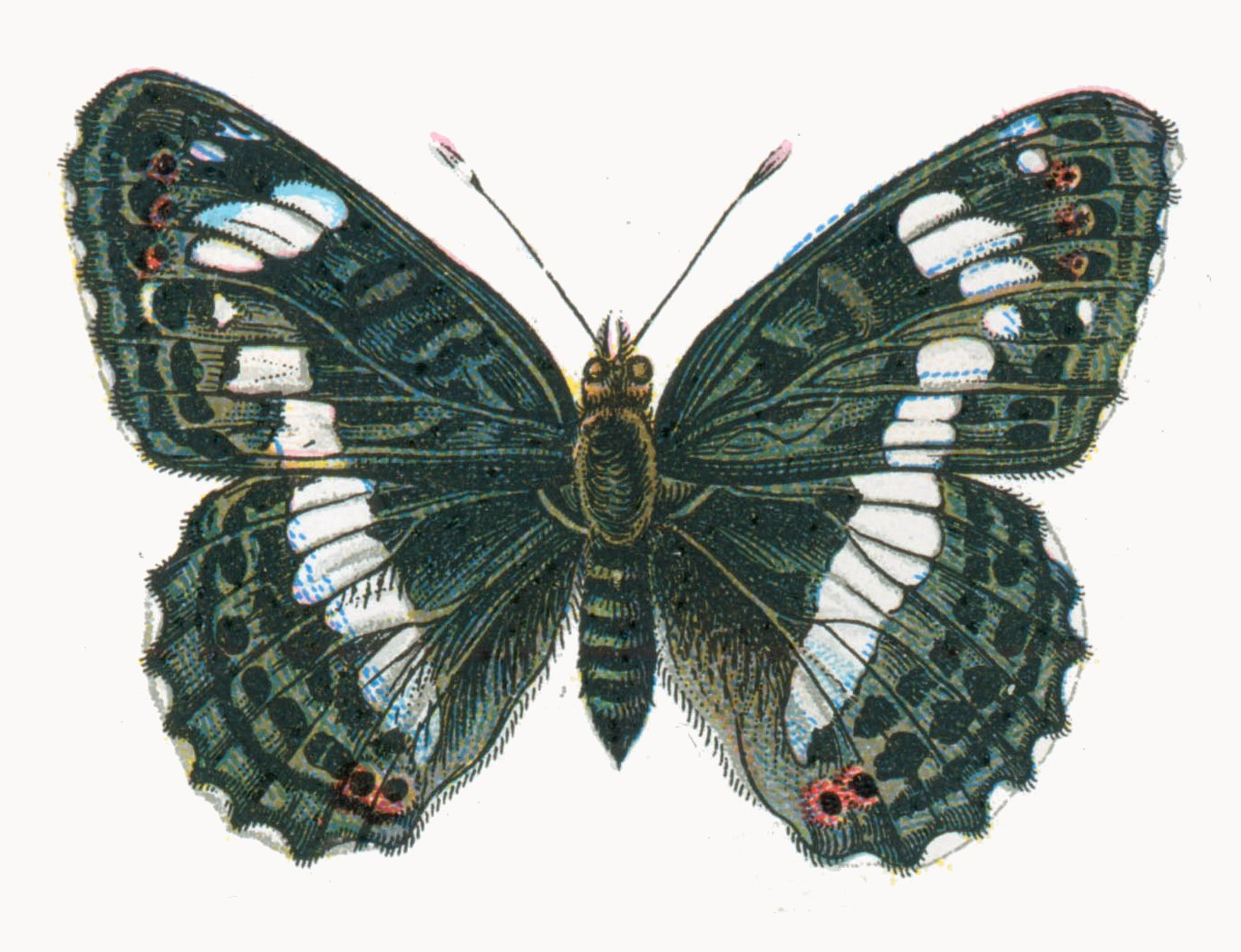 Limenitis camilla